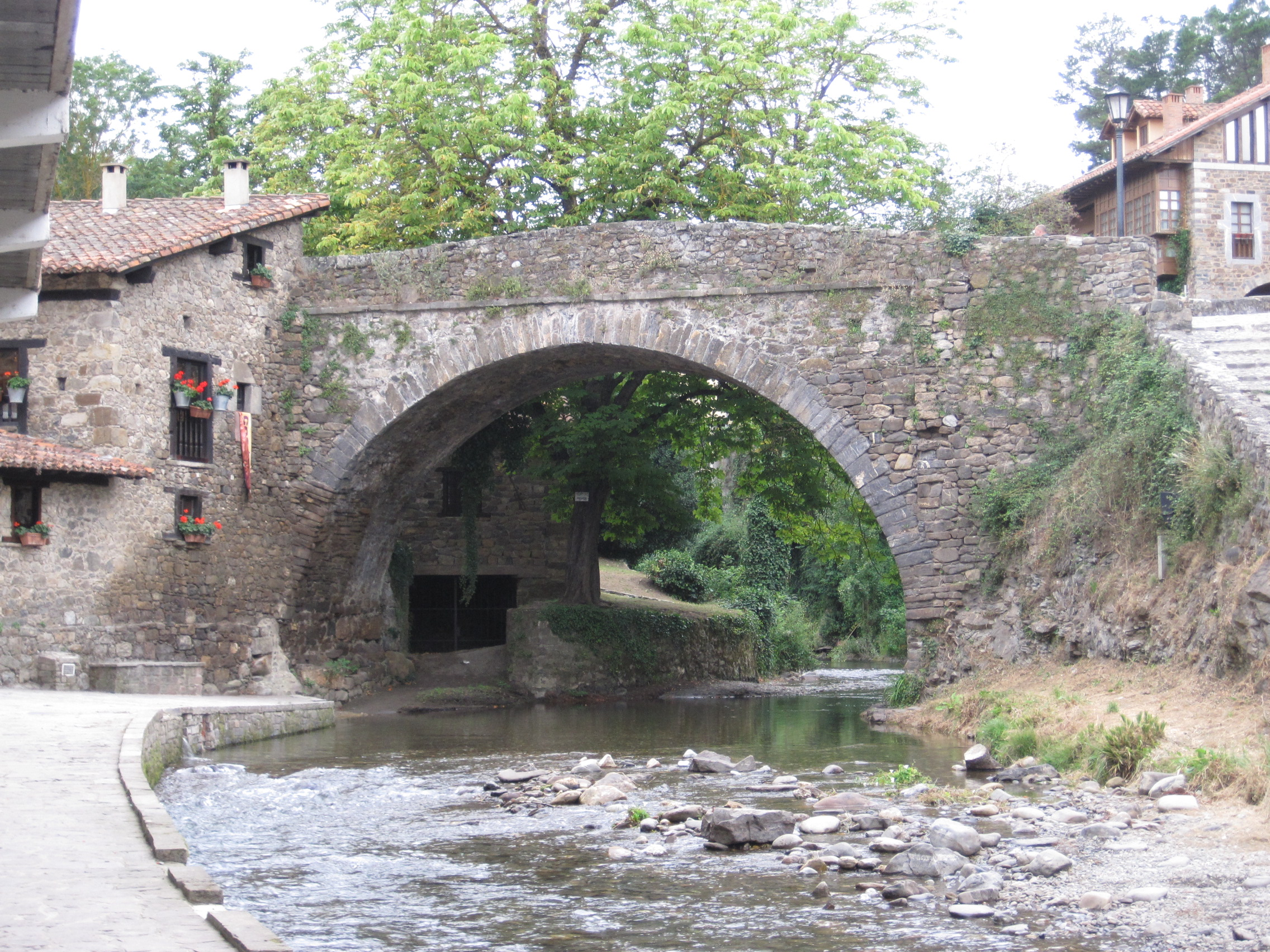 Puente de San Cayetano, sobre el río Quiviesa, en Potes (Cantabria, España).